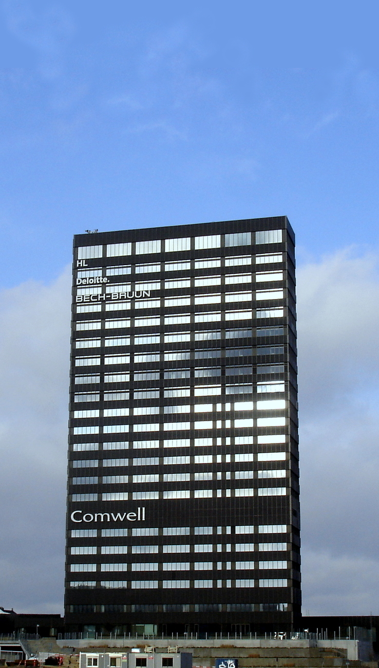 Aarhus City Tower, set fra Jægergårdsgade